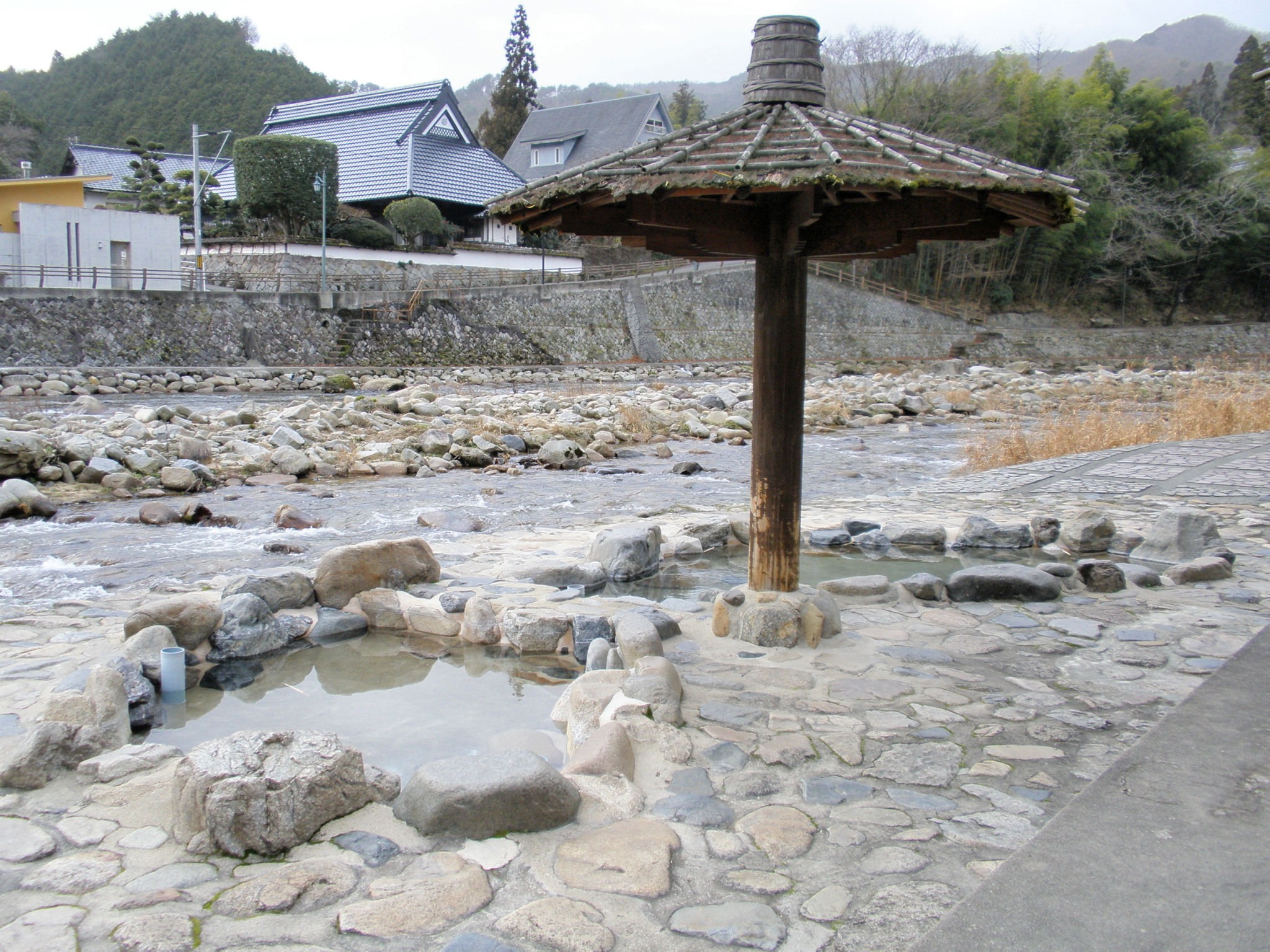 奥津温泉街の足踏洗濯場